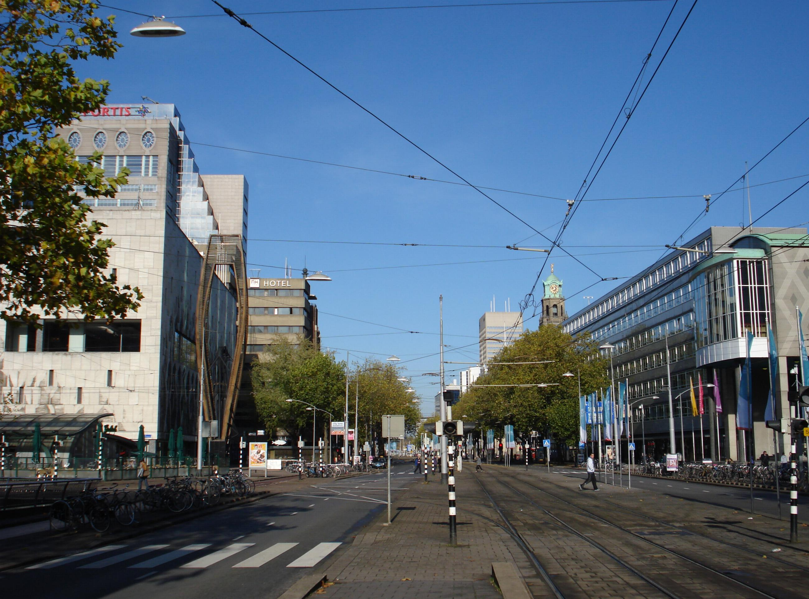 Zicht op een deel van de Coolsingel in het centrum van Rotterdam